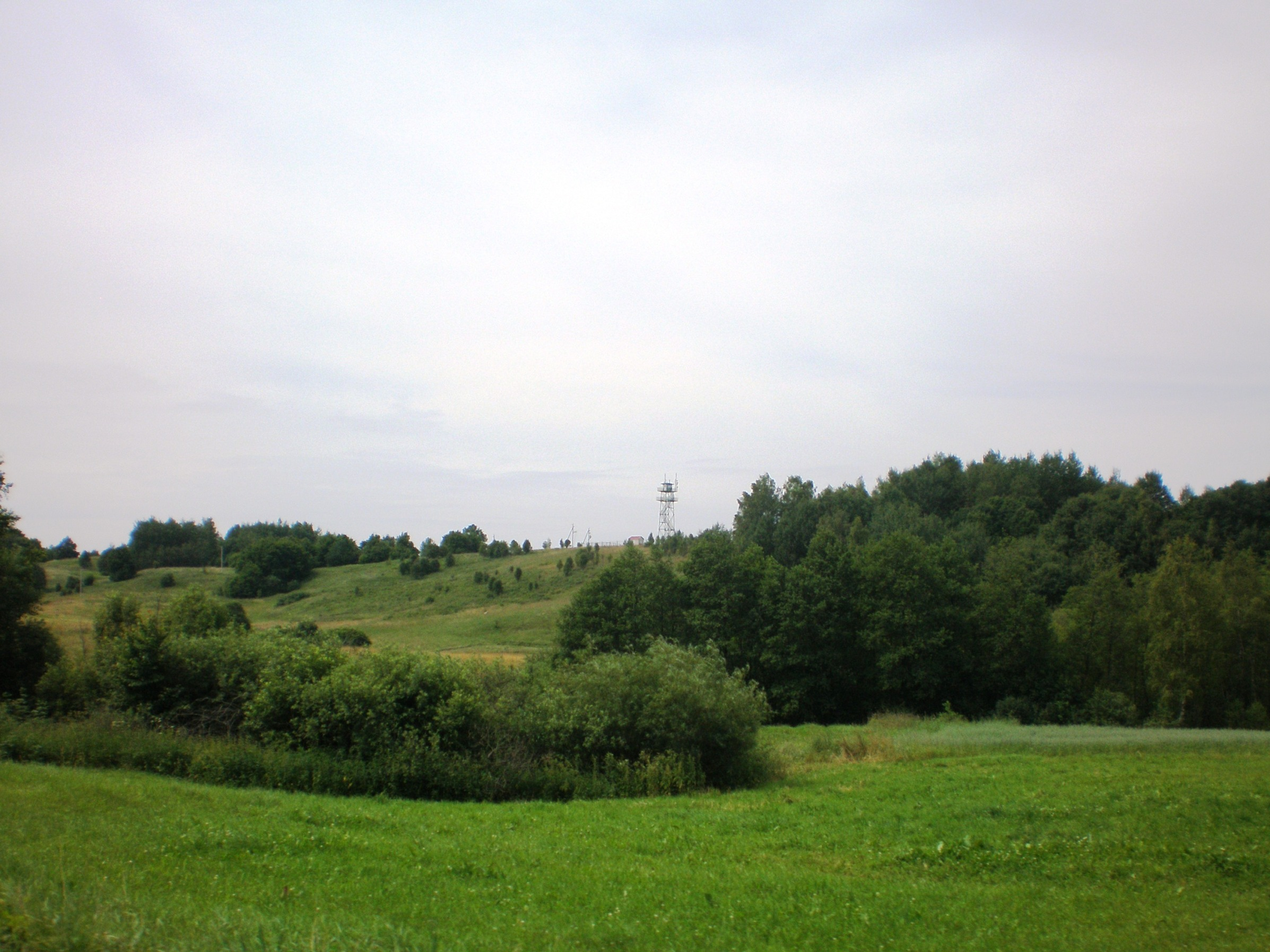 Totorkiemio kalvynas, Vilkaviškio raj.